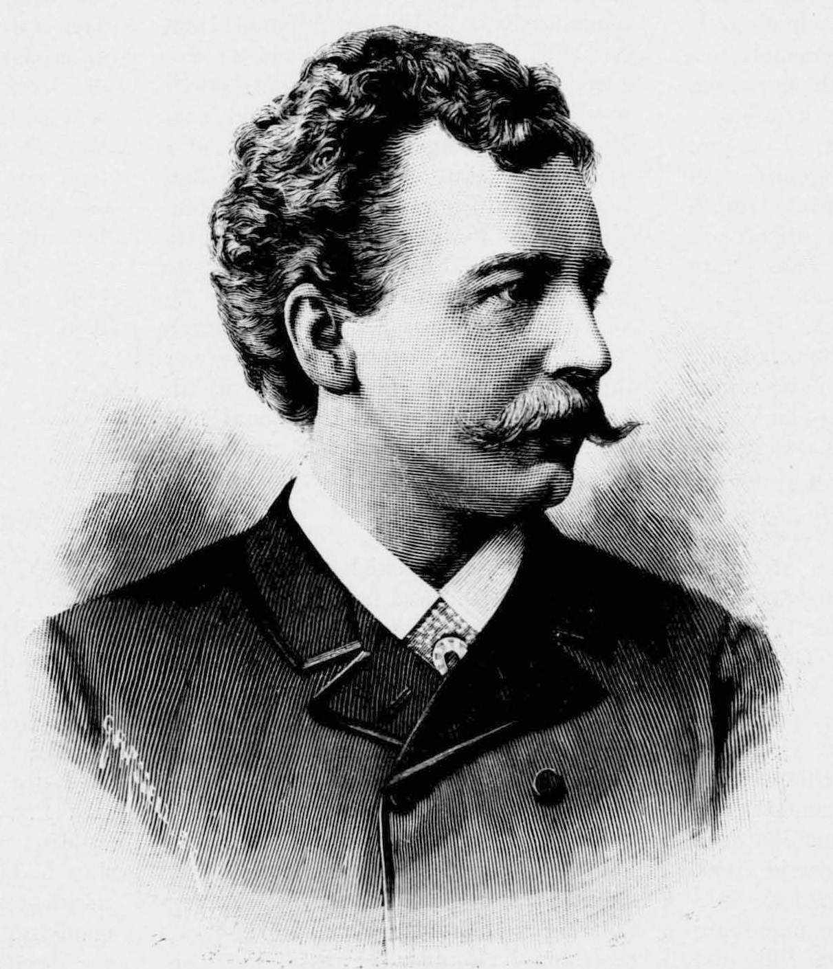 Heinrich Bötel (1858-1938)